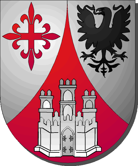 Señorio San Baltazar de los Arias